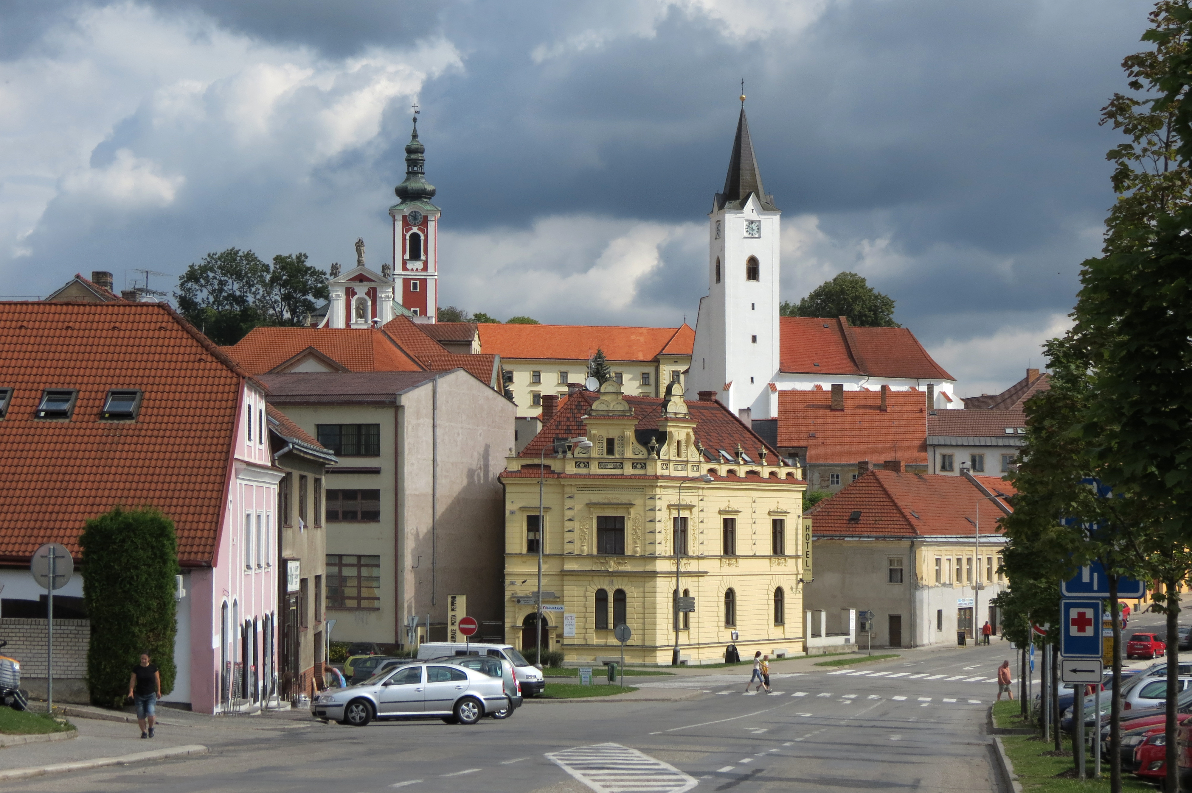 Pacov: pohled na historické centrum, vlevo (zámecký) kostel sv. Václava, pak vlastní zámek a vpravo děkanský chrám sv. Archanděla Michaela